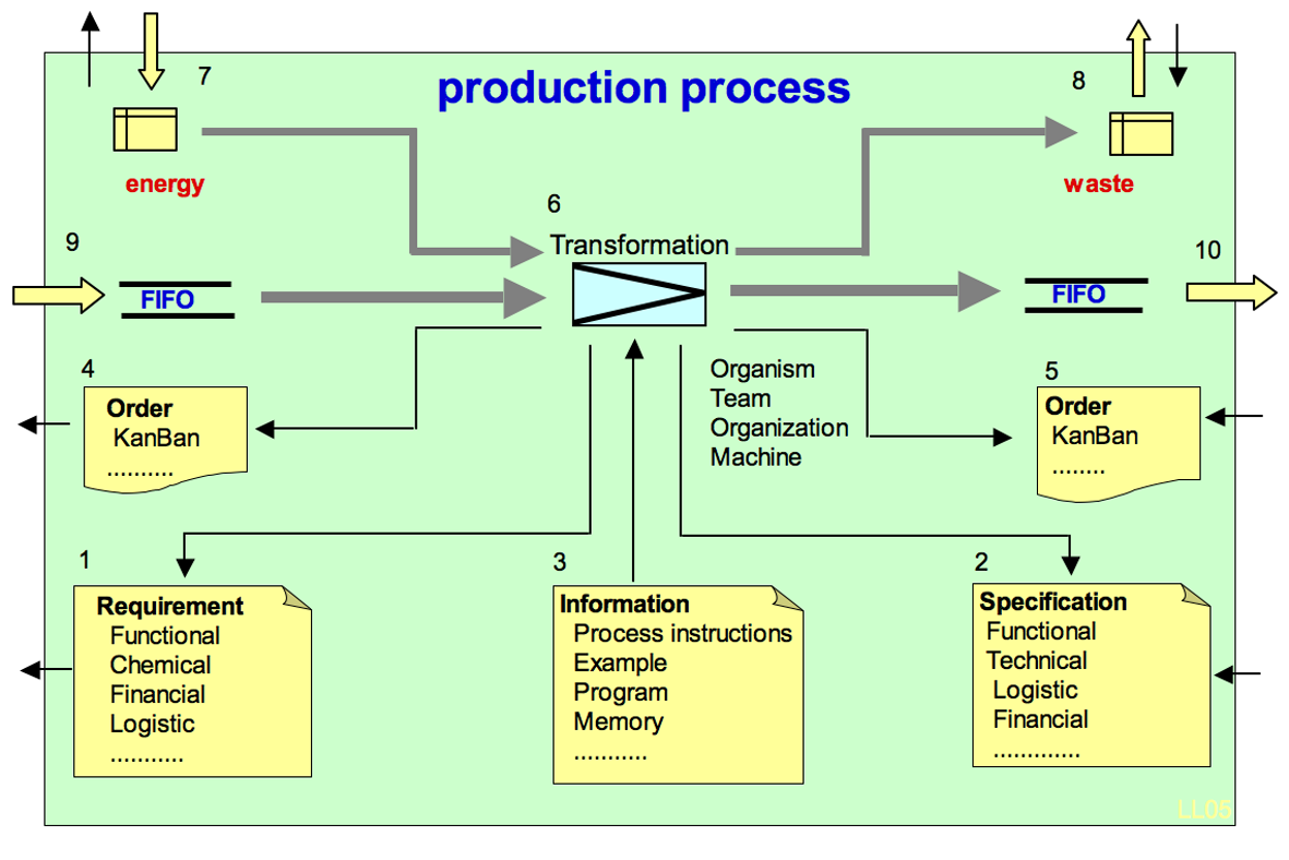 Production model, description off. / Productiemodel, beschrijving van. Dec. 2005 Laurens van Lieshout